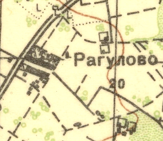 Топографическая карта Ленинградской области, квадрат О-35-23-В (Хотыницы), деревня Рагулово